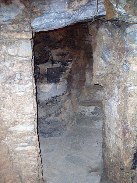 Το Σπήλαιο της Εύρεσης